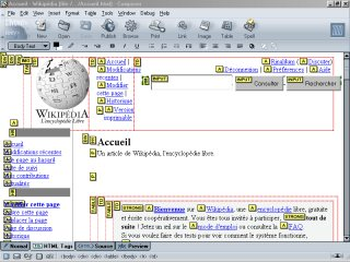 Photo d'écran de Mozilla Composer petit format, Licence GPL et GFDL crée par Rinaldum 6 jan 2004 Rinaldum